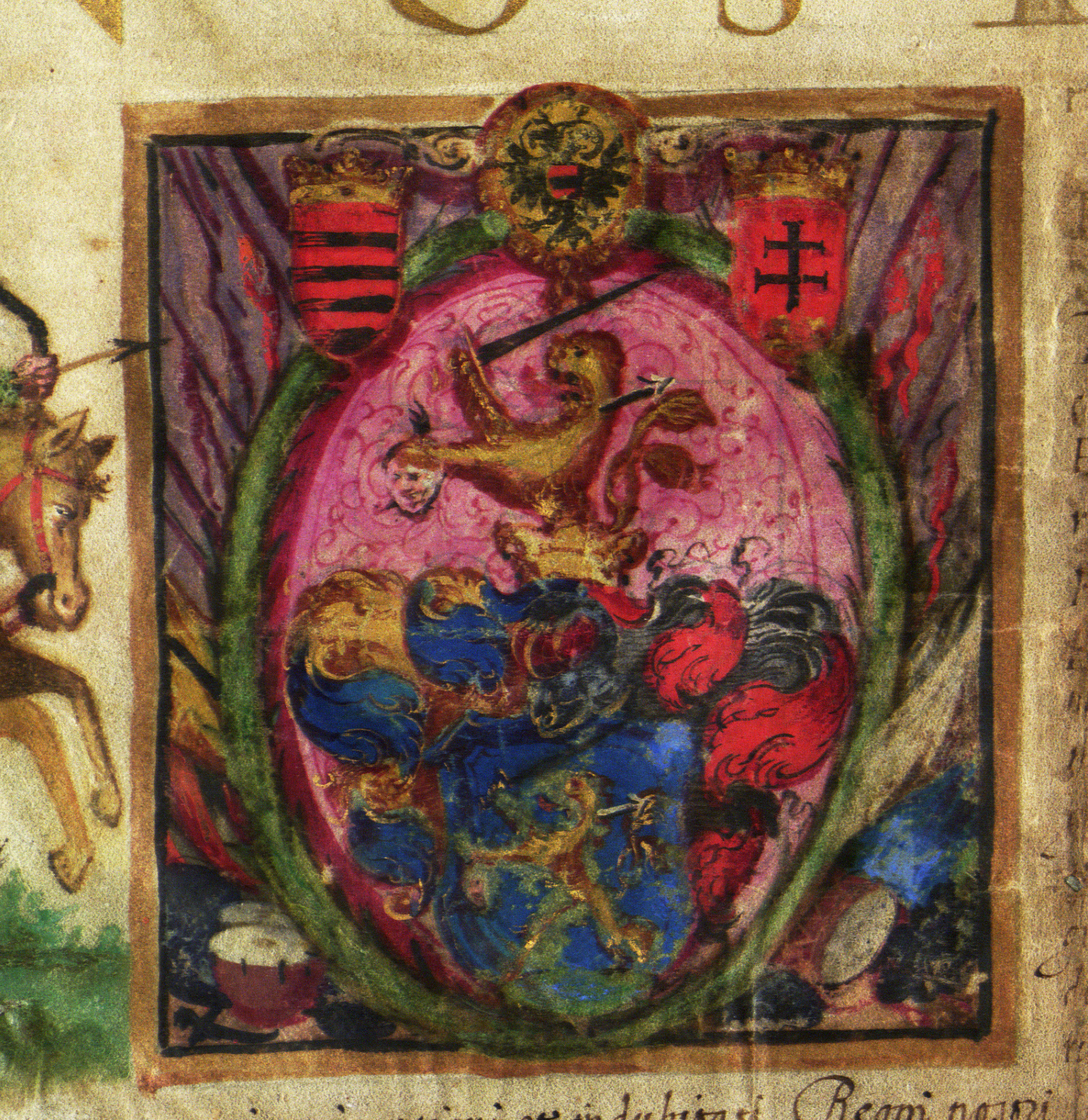 Wappen im Adels- und Wappenbrief an Mihály und Illés Dobray alias Egry vom 2. 11. 1646